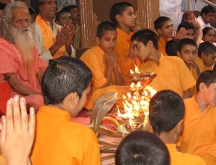 פוג'ה בדיוואלי רישיון נוצר על ידי משתמש:Motyka